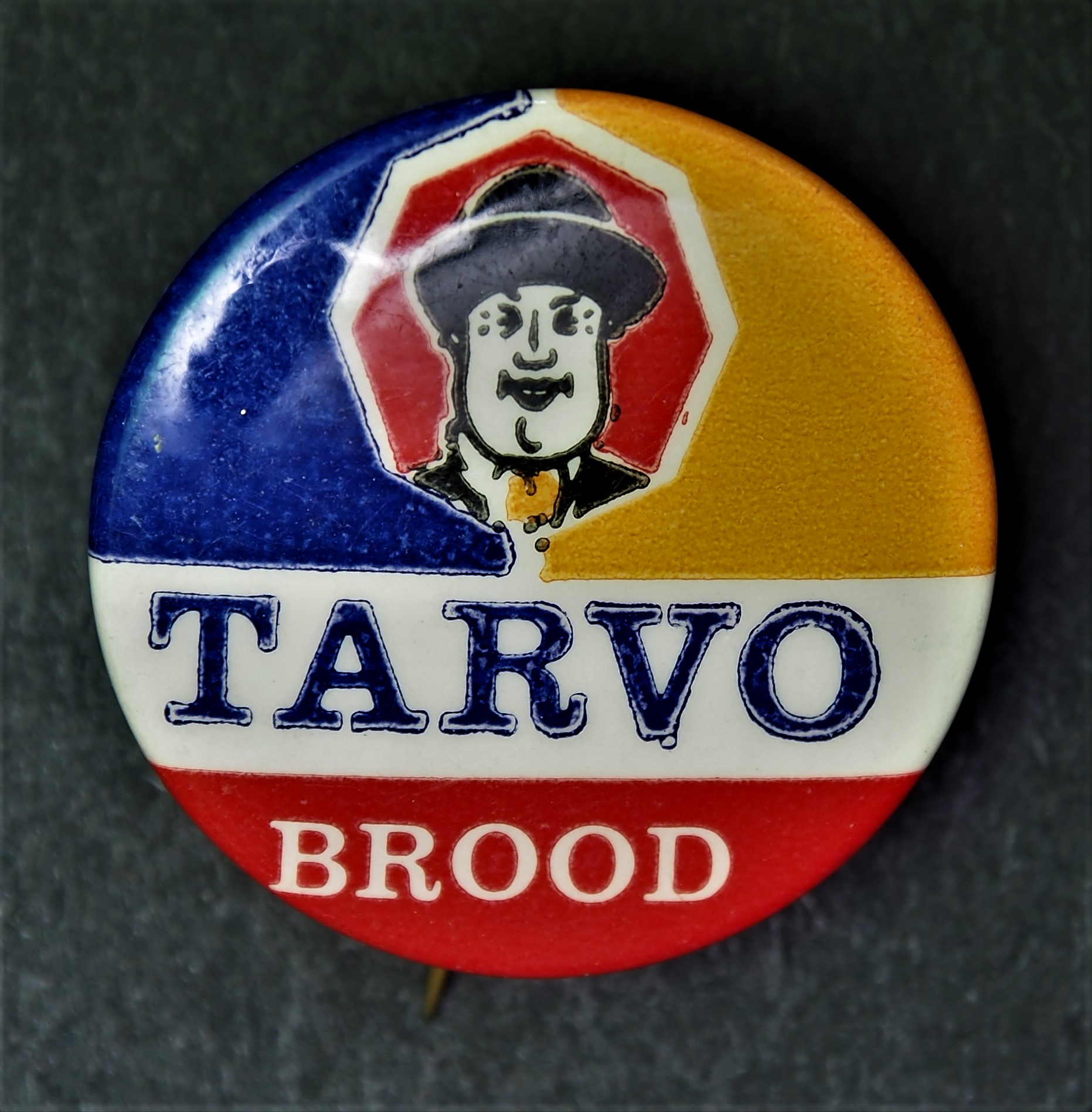 Reclamespeldje van Tarvo, een oud Nederlands product.